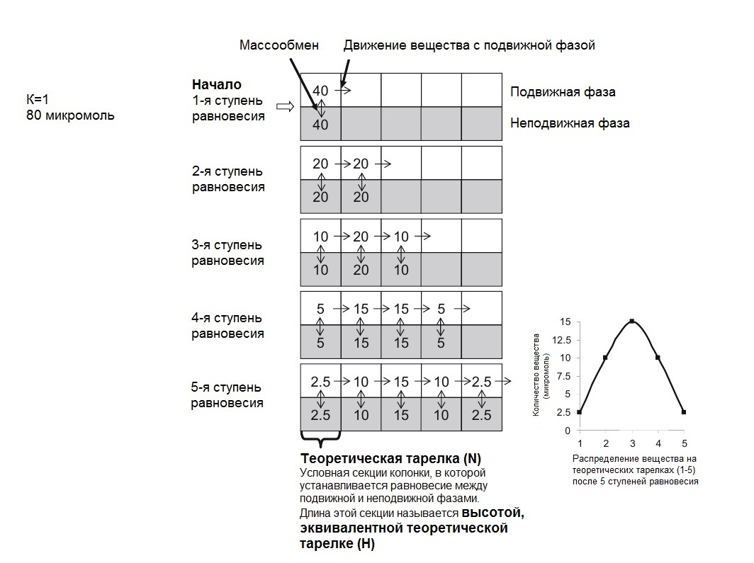 Модель распределения в хроматографической колонке